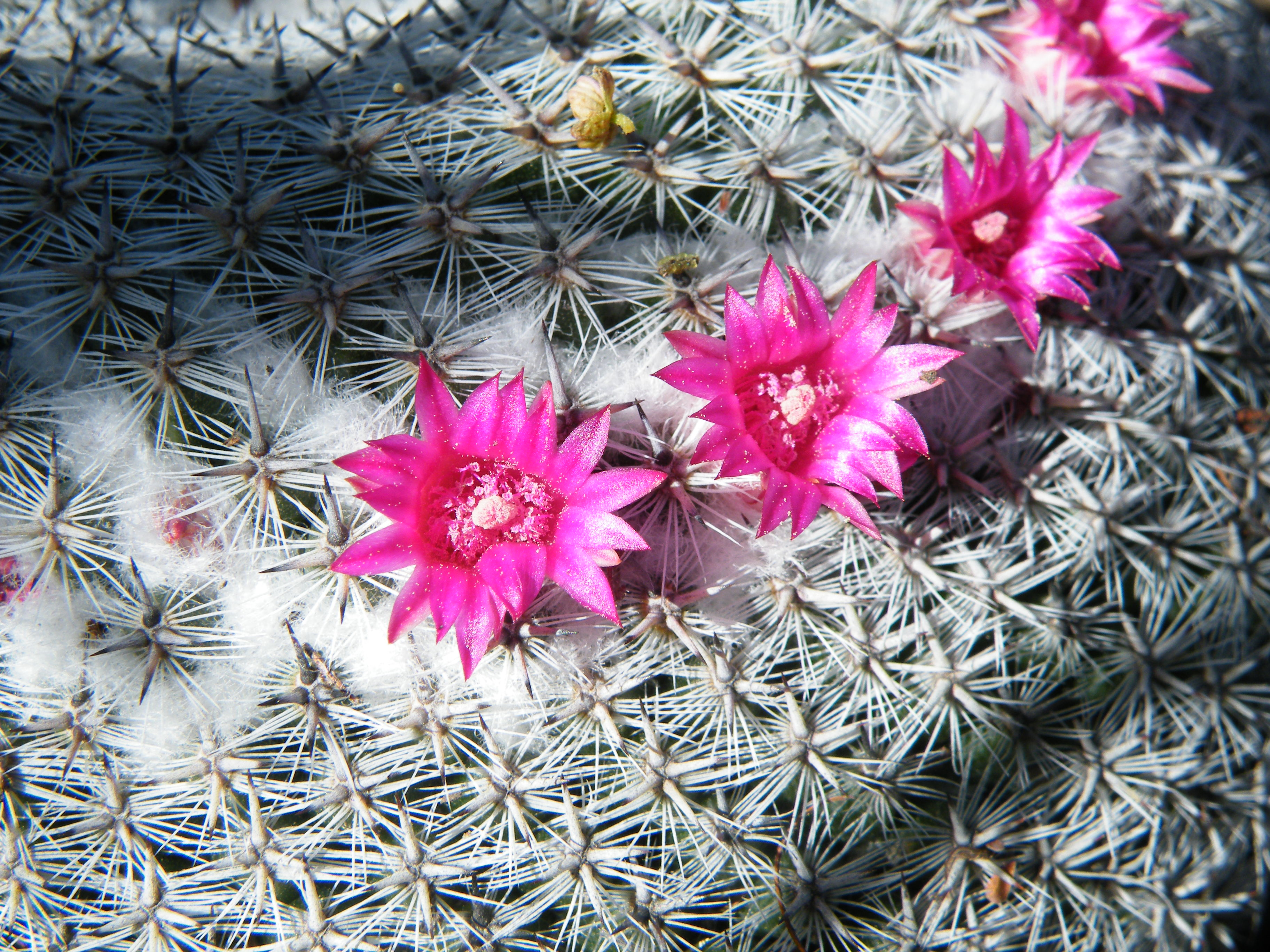 Guadalcazar 3, San Luis Potosi